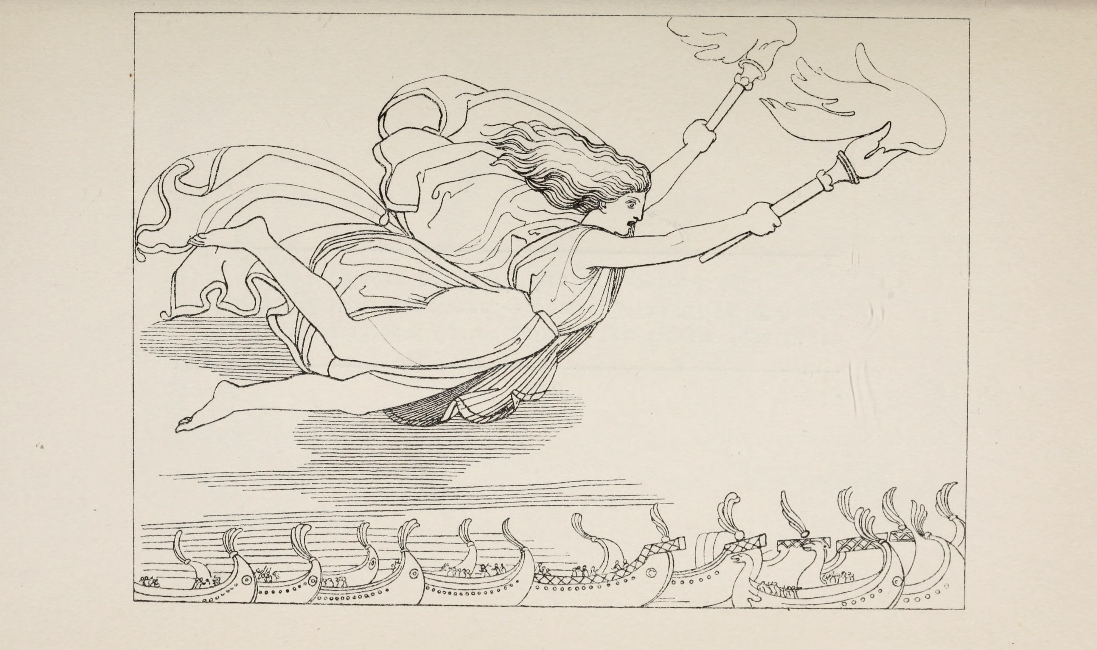 Die Eris, von Zeus zu den Schiffen gesandt. – Homer, Ilias XI. 3.